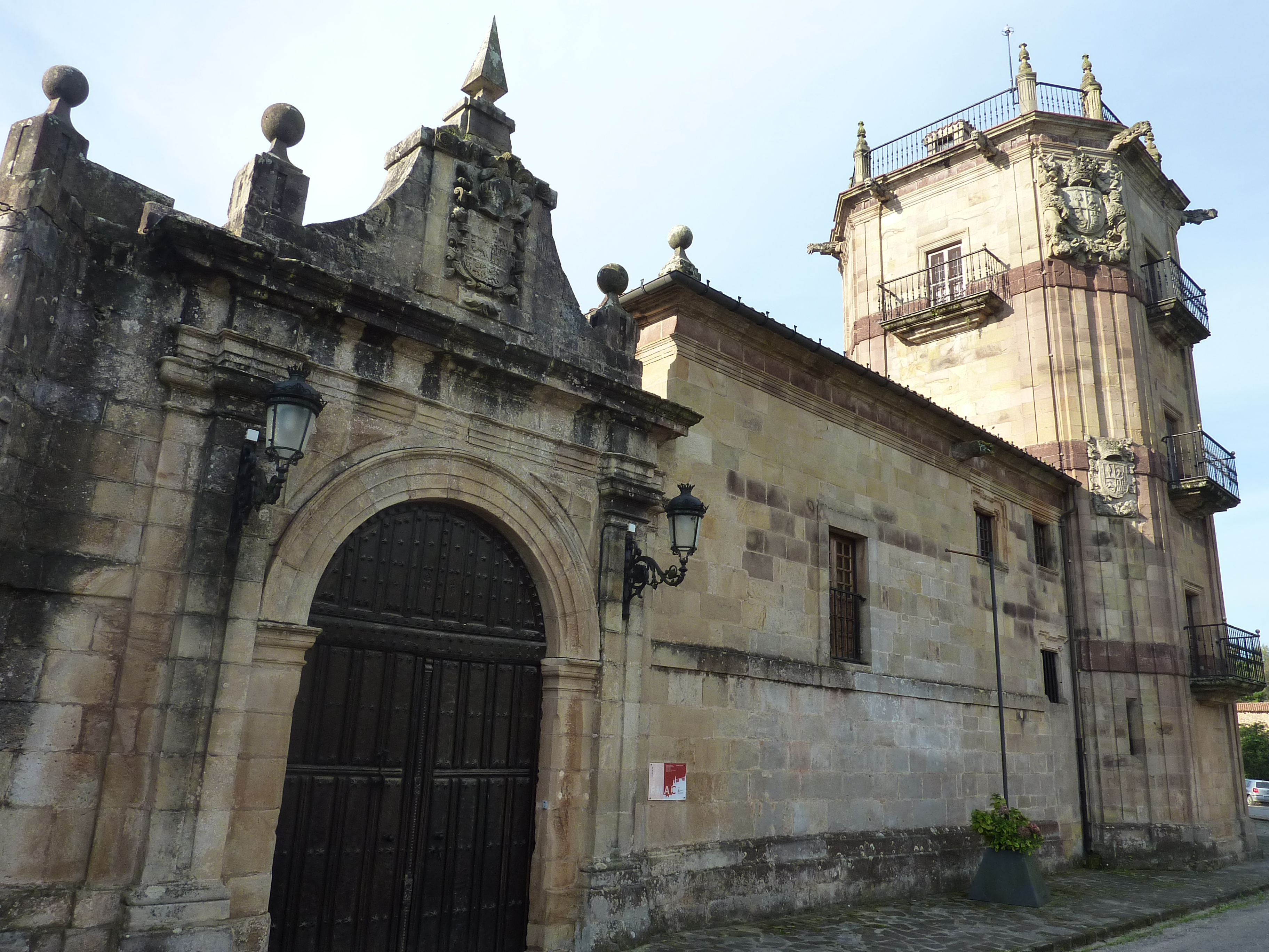 Vista general.